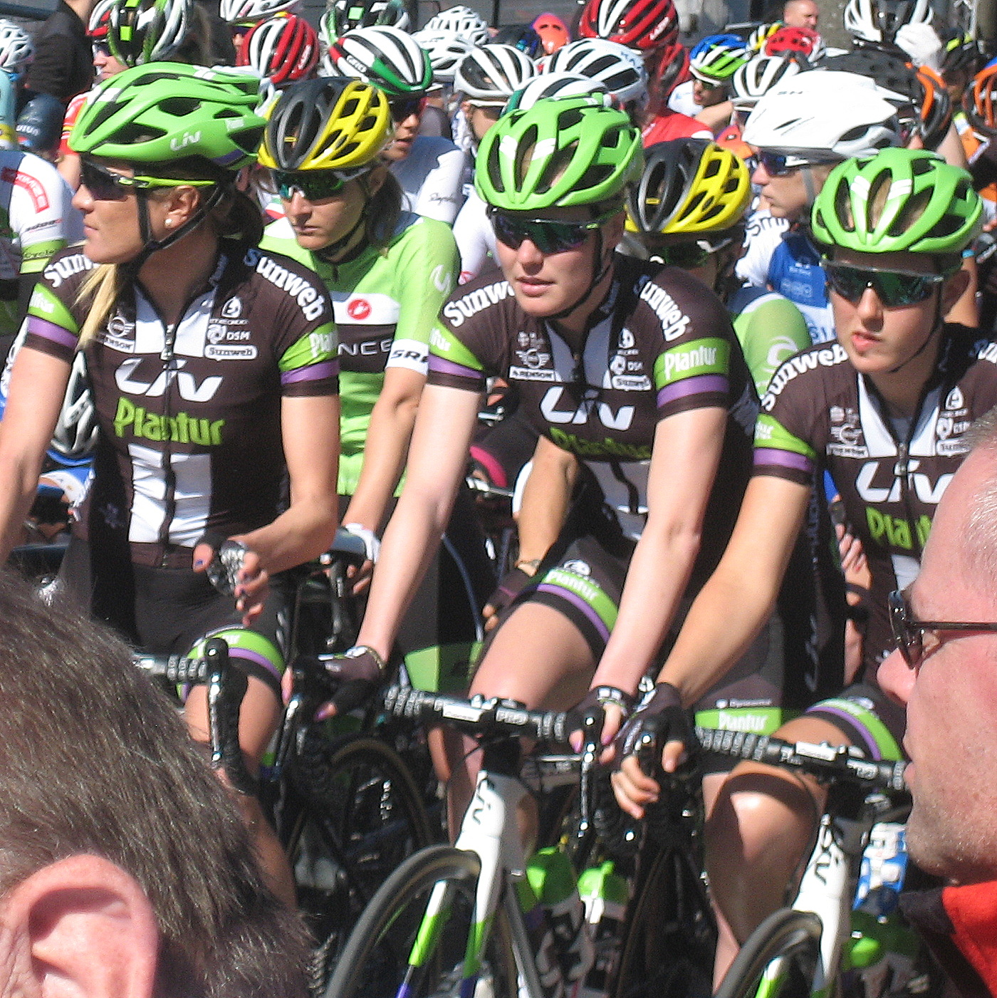 Team Liv-Plantur aan start Waalse Pijl 2016